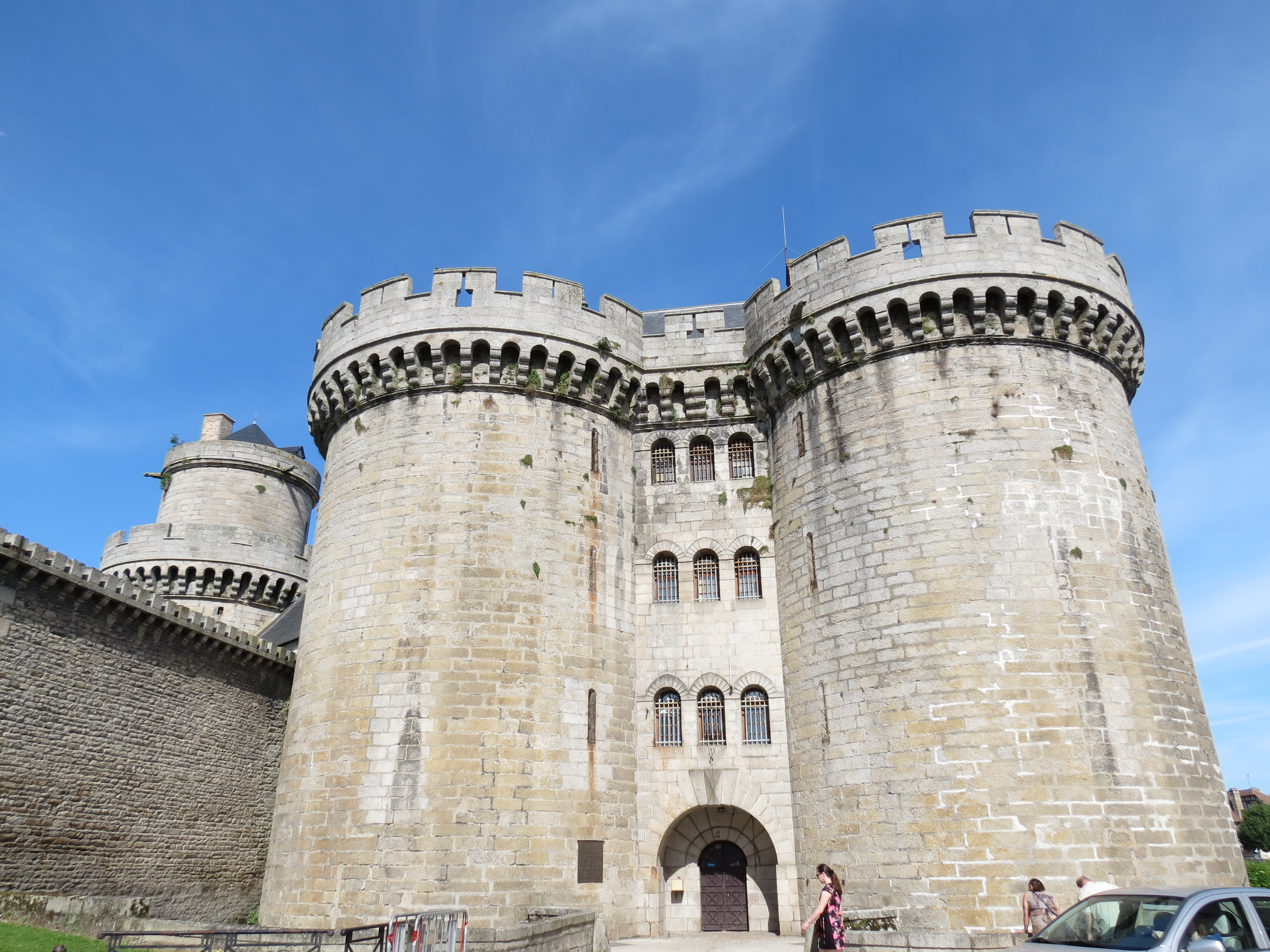 Château des ducs, Alençon, Orne, Normandie.